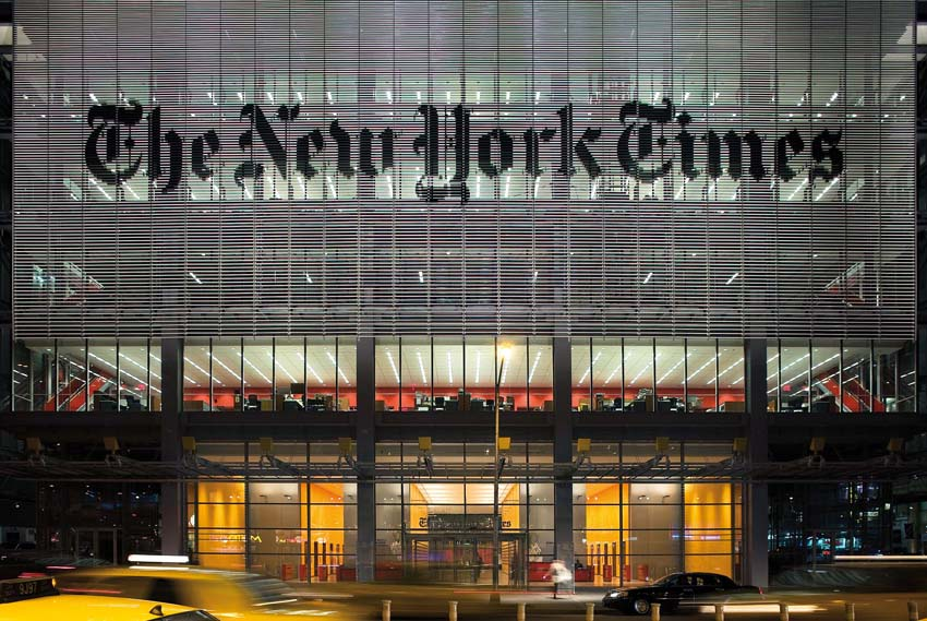 2000-2007 Nuova Sede del New York Times, New, York, NY, U.S.A - Renzo Piano Building Workshop, architects in collaborazione con FXFowle Architects, P.C. (New York) - ph. Michel Denancé